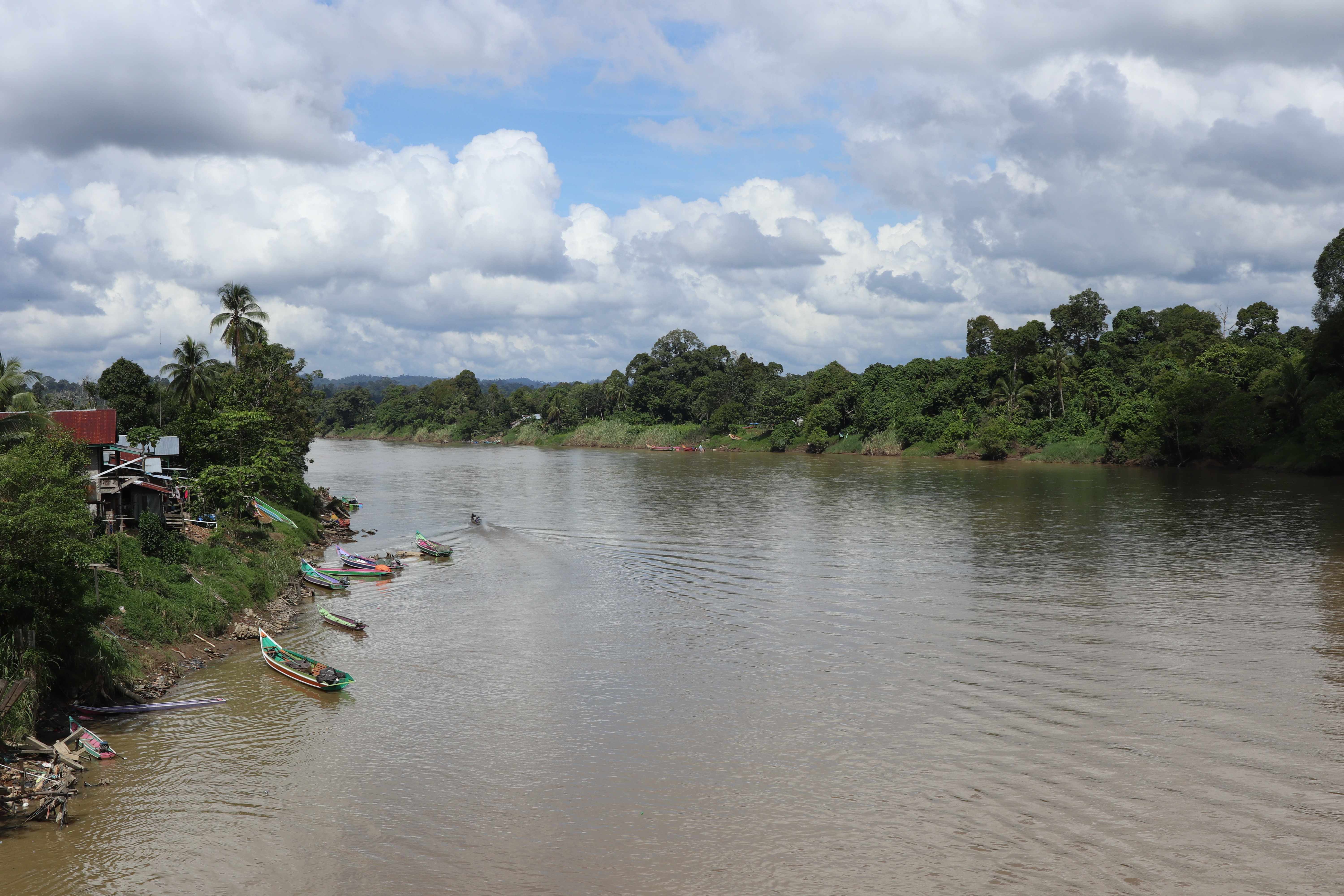 Sungai Sembakung, salah satu sungai besar di Kabupaten Nunukan, Kalimantan Utara.